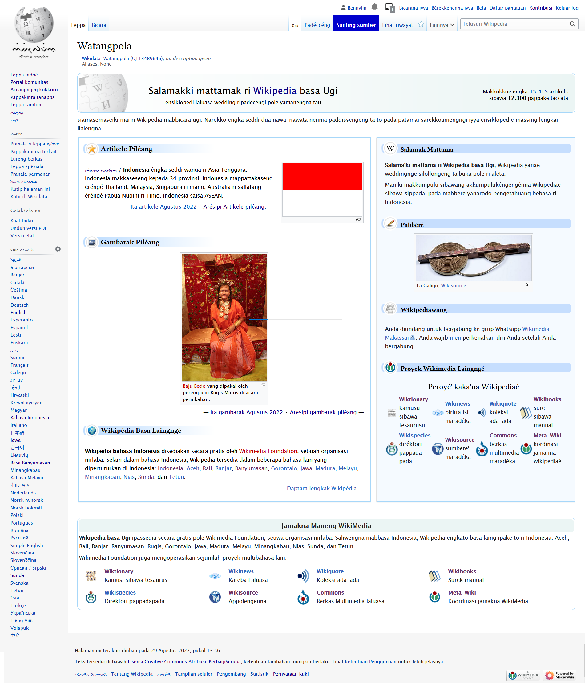 Tampilan Wikipedia Bugis